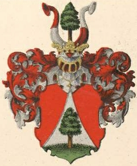 Schroederi (Burtnieki) suguvõsa aadlivapp